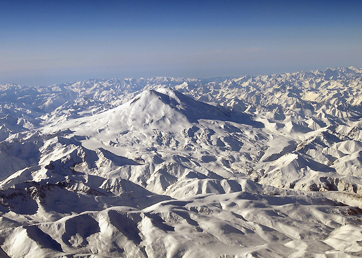 Эльбрус с высоты 9000м